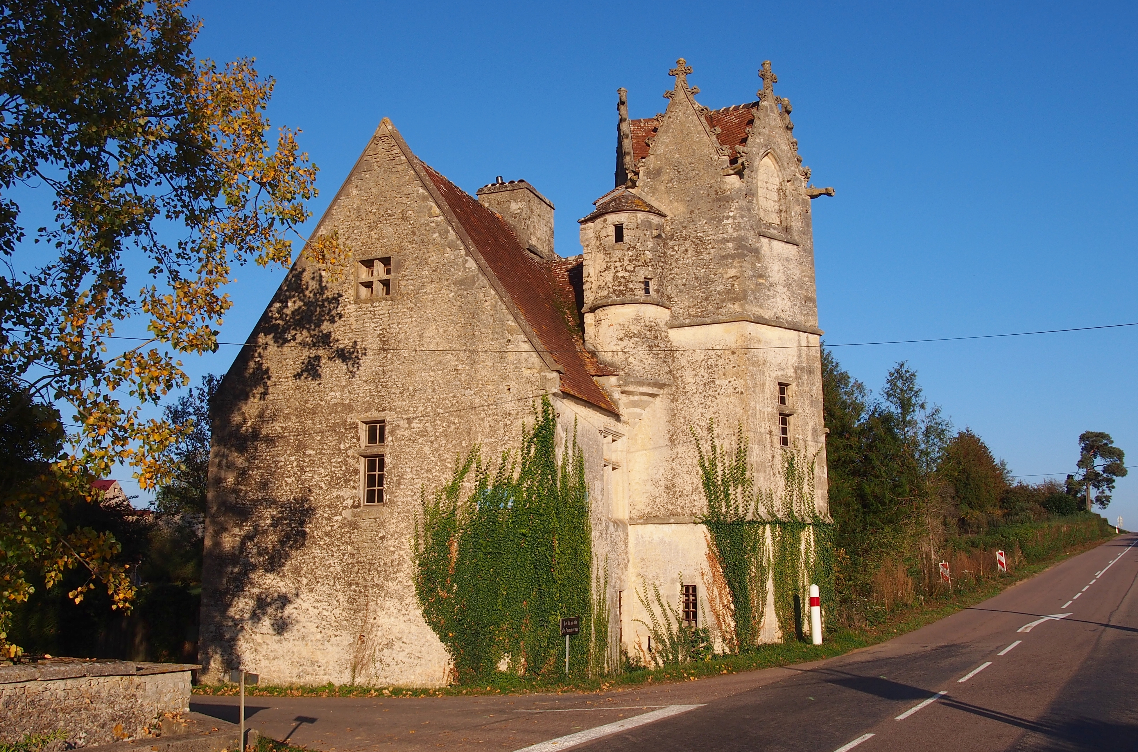 Montgaroult (Normandie, France). Le manoir de Pommereux.